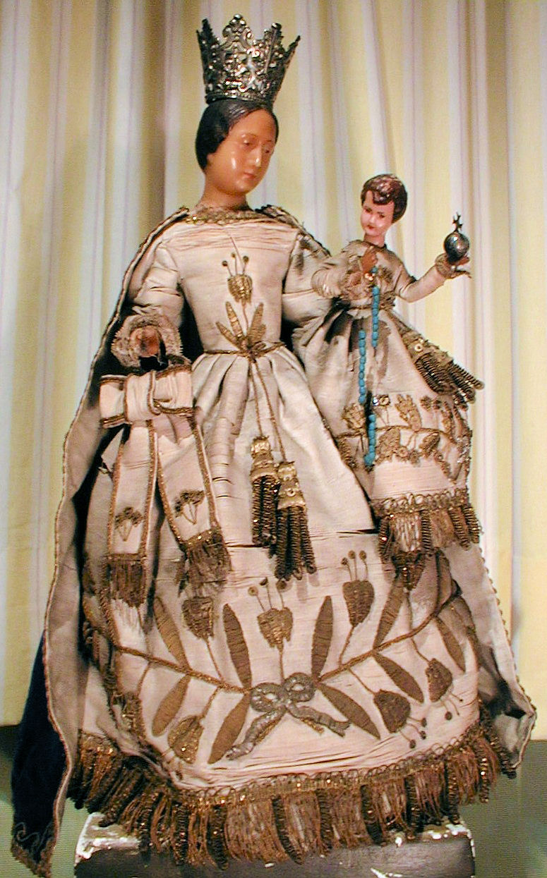 eigen opname, eigen privé collectie. Nadrukkelijke vermelden op commons !!!!!!!!! Maria moedre gods uit was ; volksdevotie. boorduurwerk op wiite zijde. Het goddelijk Kind Jezus houd een aardbol vast.--Carolus 13 dec 2005 18:46 (CET)